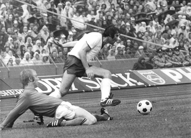 ADN-ZB / Mittelstädt / 16.7.74 [Herausgabedatum] / Gelsenkirchen: X. Fußball-Weltmeisterschaft - Zweite Finalrunde, Gruppe A: Niederlande gegen DDR 2:0 am 30.6.74. Peter Ducke (DDR) zieht hier an Wilhelms Hijsbergen (links) vorbei.